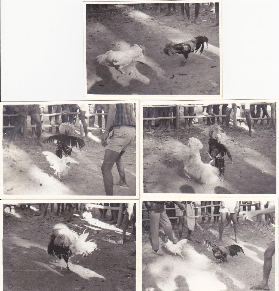 Algures em Timor--luta de galos do início até à fuga e derrota